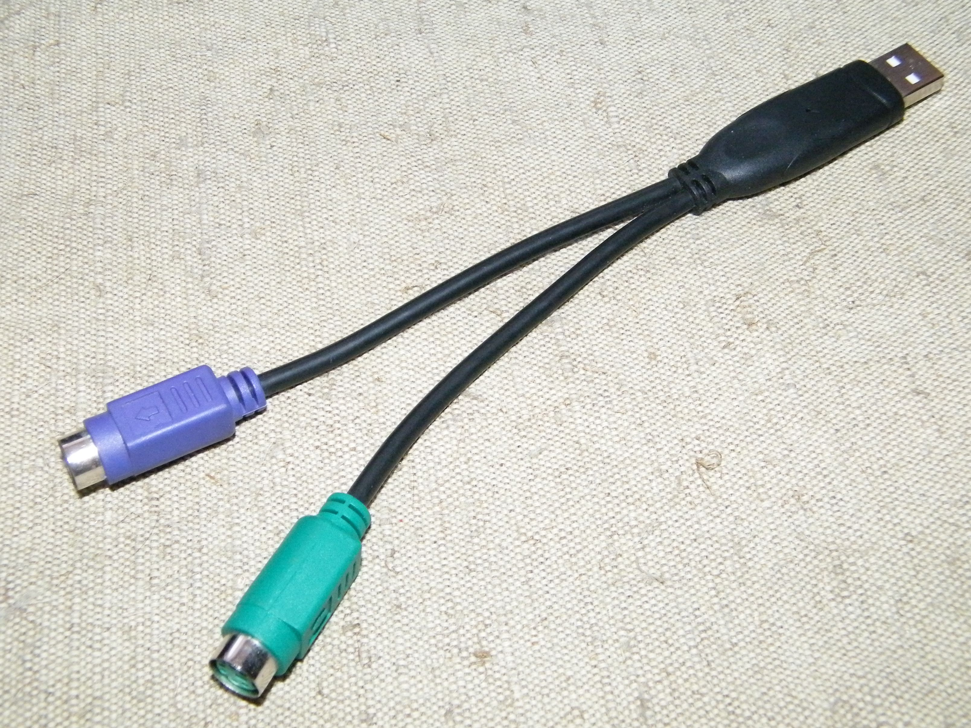 Мышь и клавиатура PS2 к USB